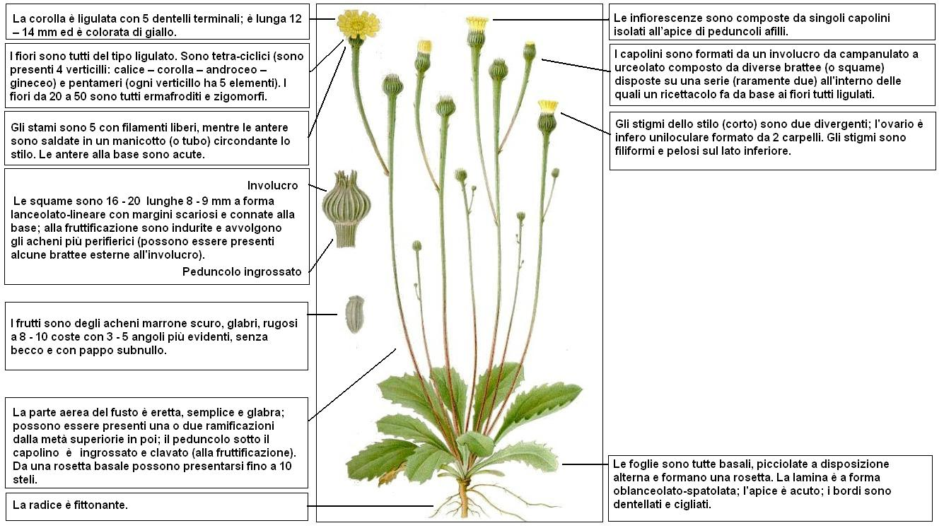 Arnoseris minima Lindman DESC